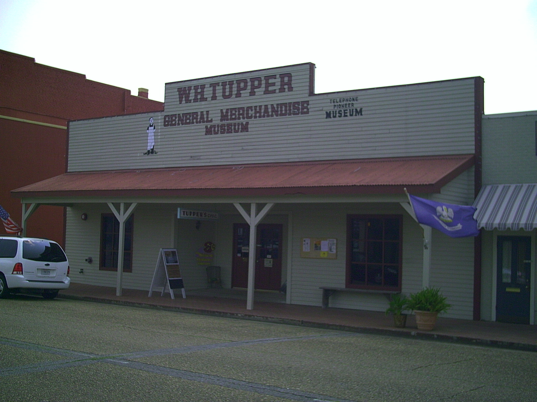 W. H. Tupper General Merchandise Museum facade.